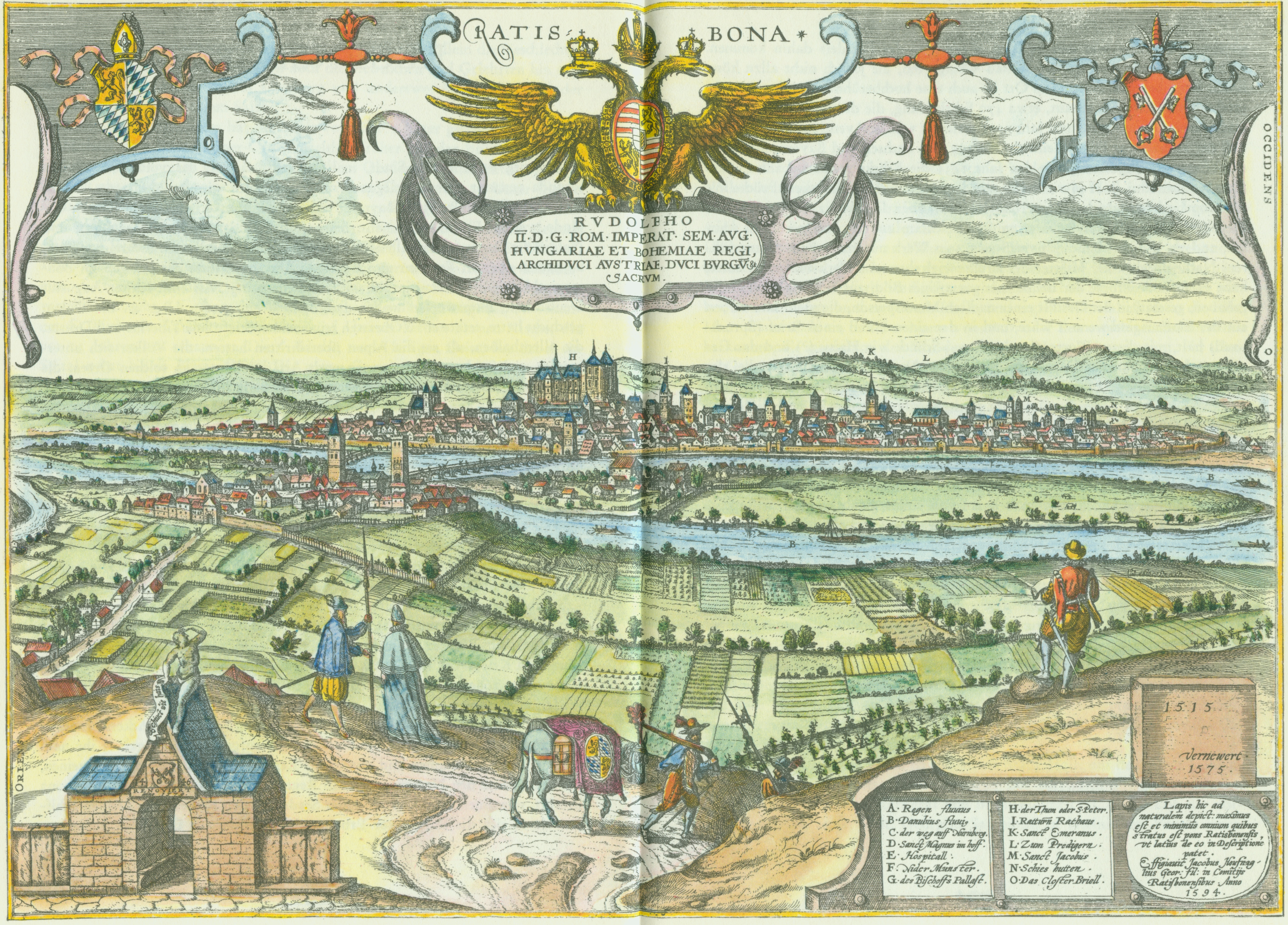 Regensburg (Ratis Bona)